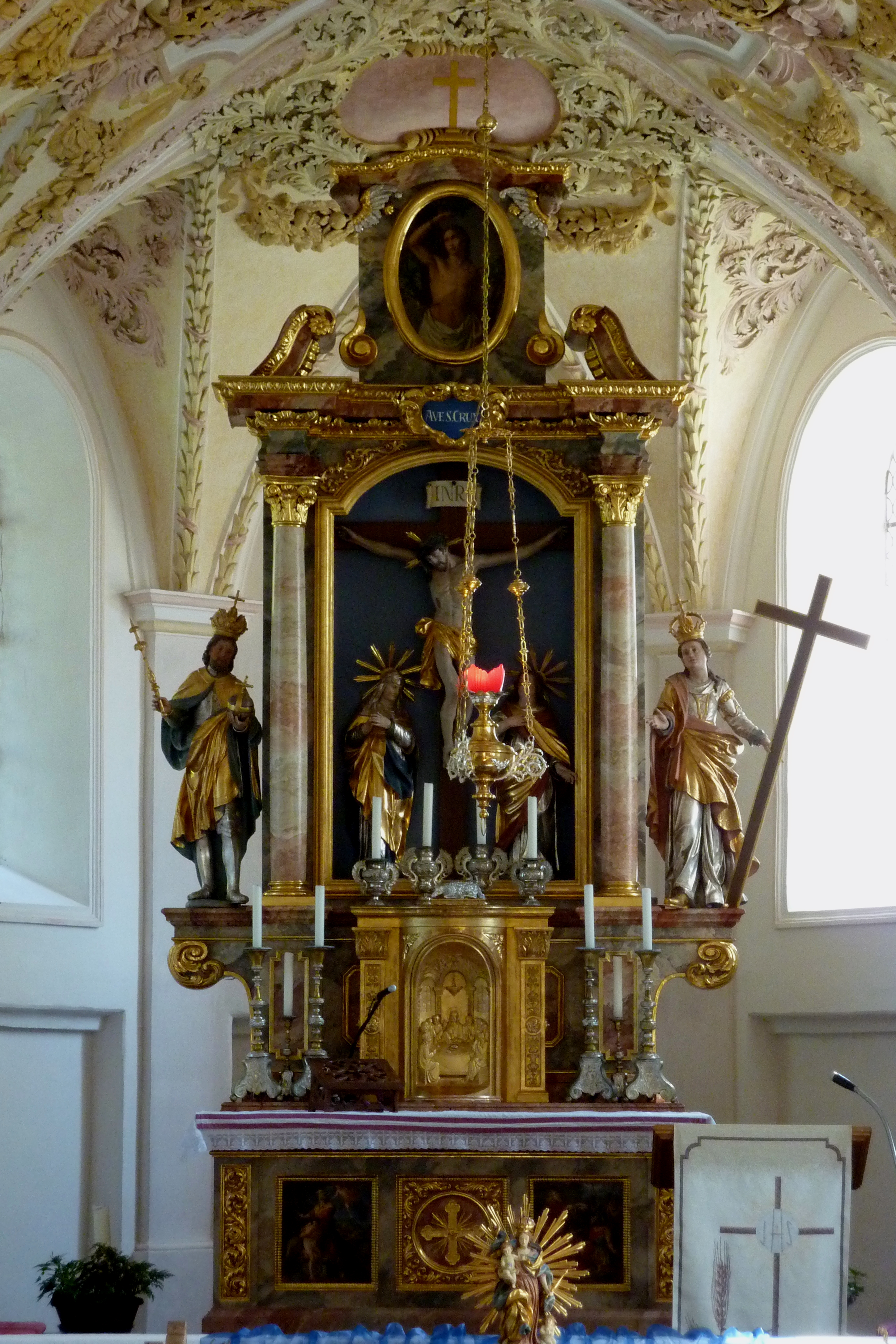 Katholische Filialkirche Heilig Kreuz in Holzhausen (Alling) im Landkreis Fürstenfeldbruck (Bayern/Deutschland), Hauptaltar von 1697